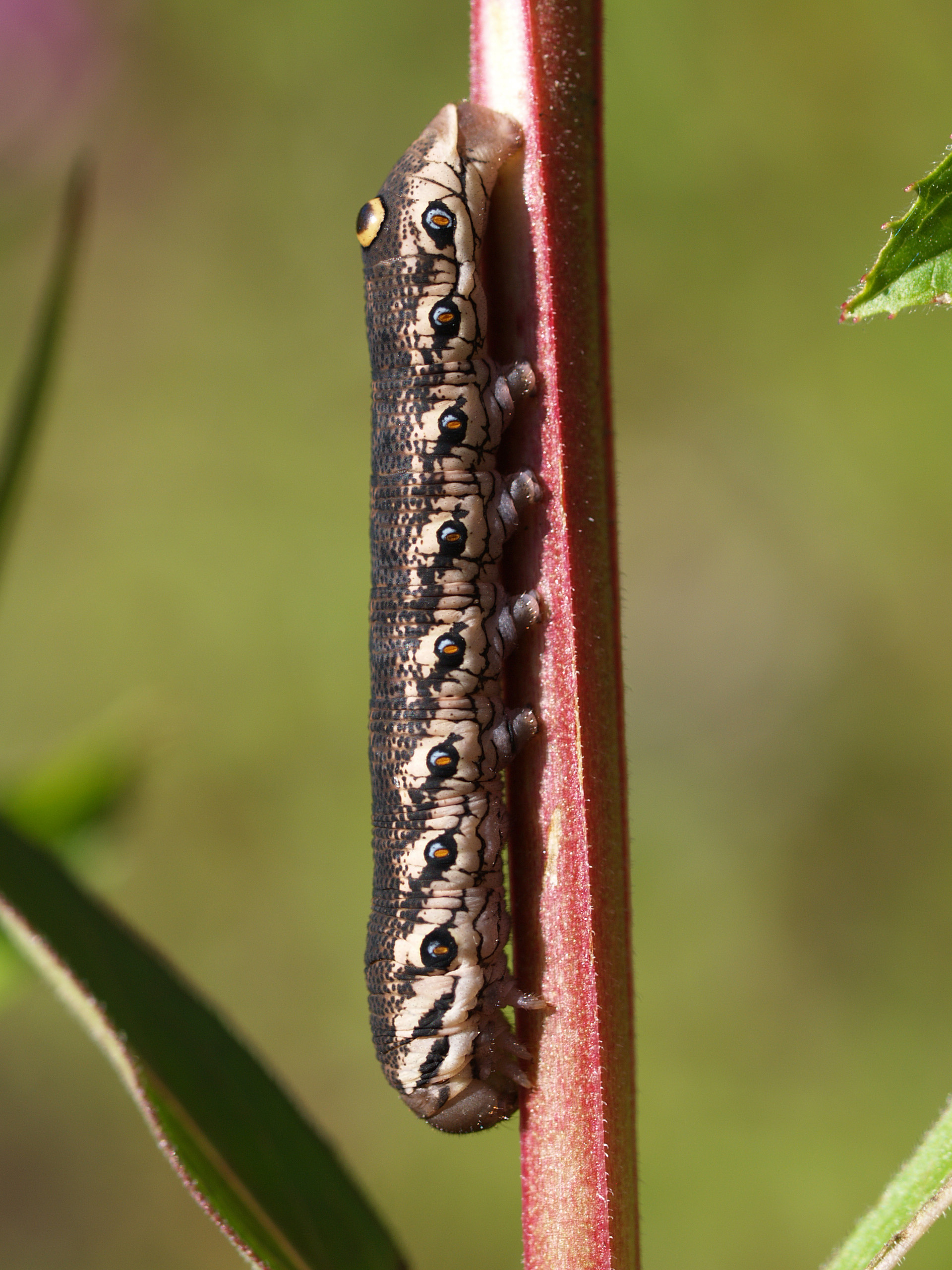 Nachtkerzenschwärmer Proserpinus proserpina, caterpillar Picture taken in Munich/Bavaria, Nachtkerzenschwärmer Proserpinus proserpina, Raupe, aufgenommen in München